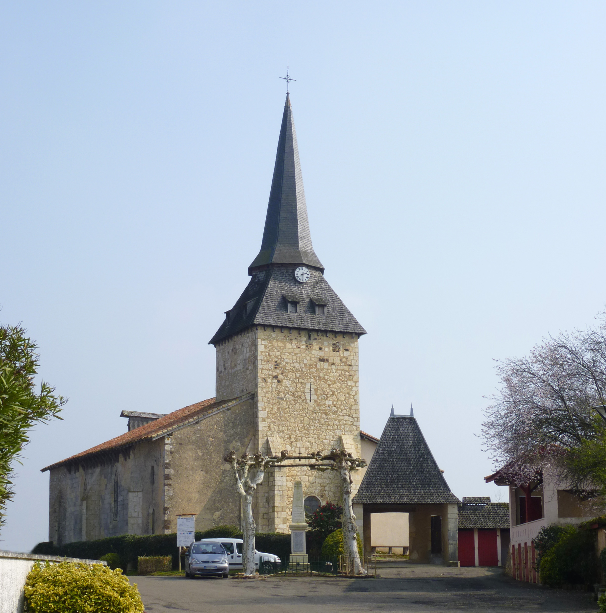 Eglise Saint-Jean-Baptiste de Larbey